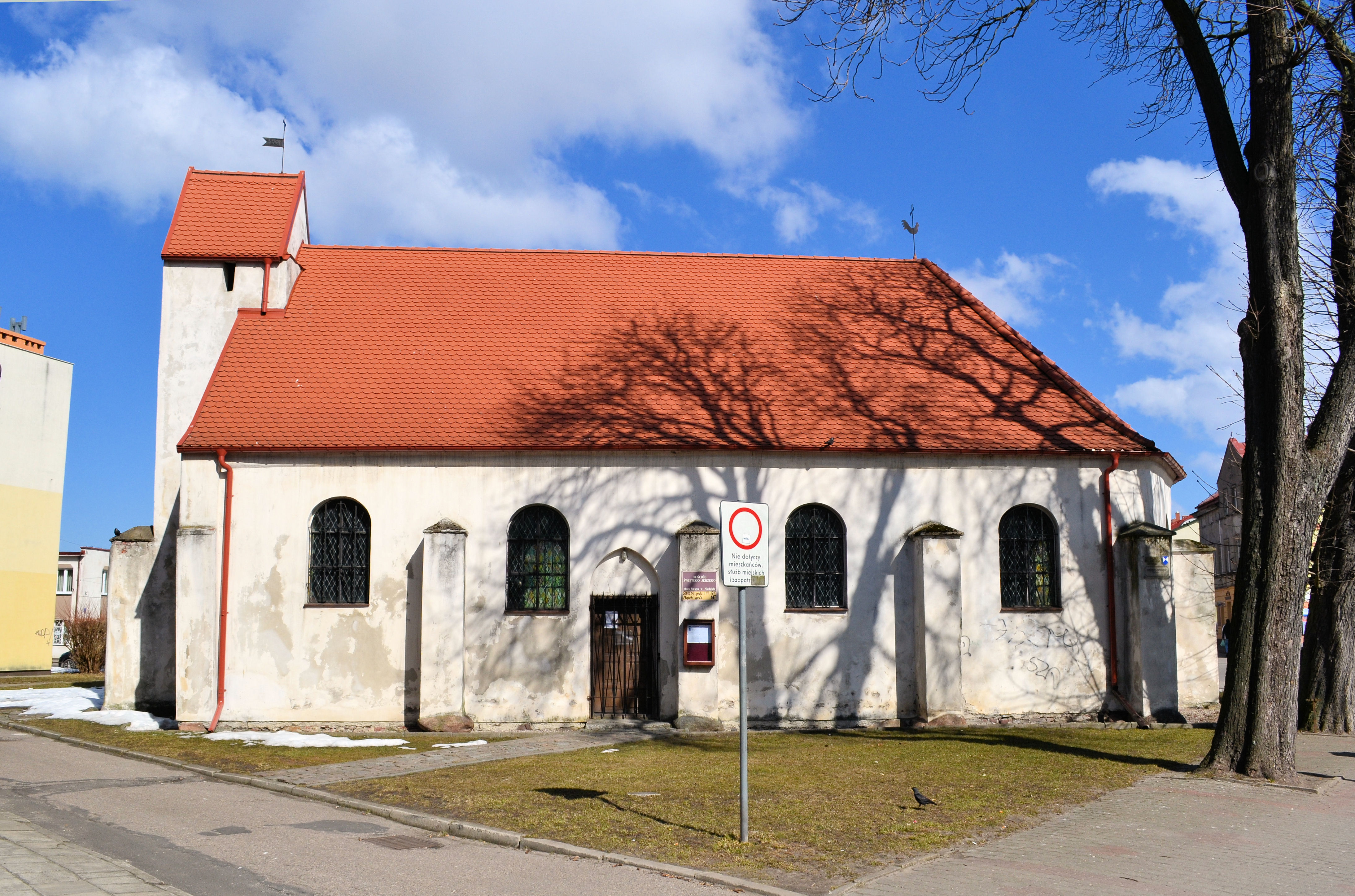 Kosciół św. Jerzego w Darłowie